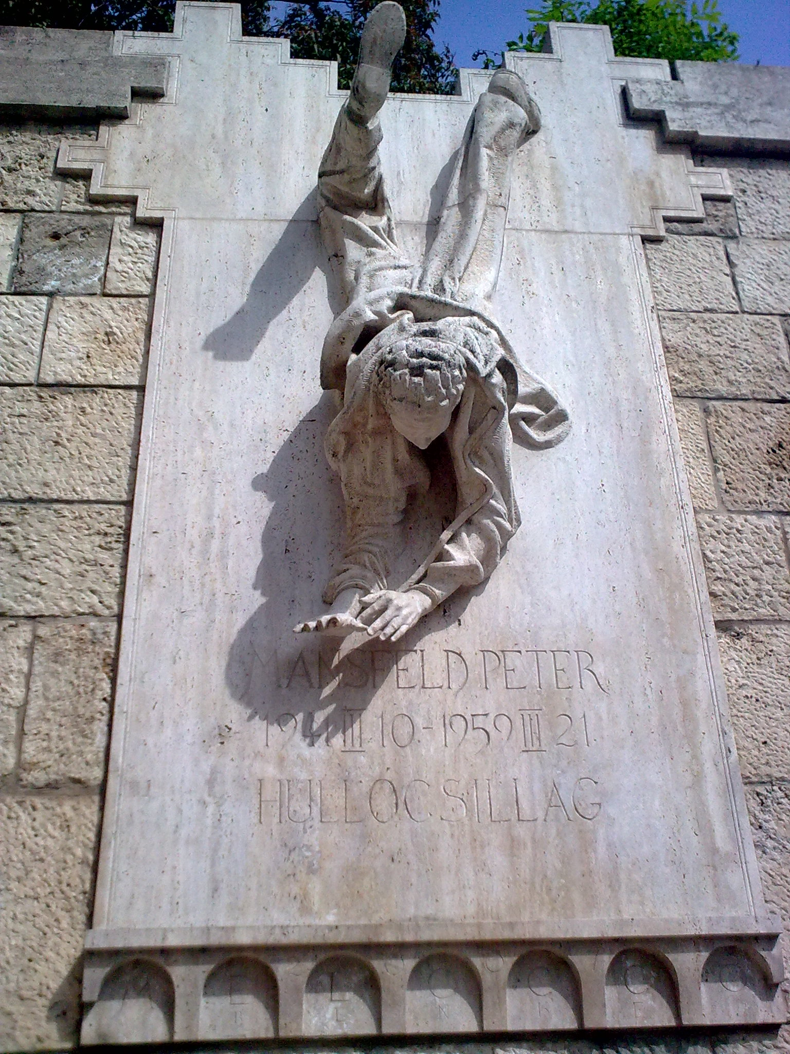 Mansfeld Péter (1956-os forradalmár) egész alakos életnagyságú dombormű, Budapest, I. kerület, Szabó Ilonka utca. A kőszobrot 2007-ben állíttatta az I. kerületi önkormányzat, alkotója Melocco Miklós. Fejjel lefelé ugró fiatalembert ábrázol. Alatta felirat “Mansfeld Péter / 1941. III. 10. – 1959. III. 21. / hullócsillag”. Lásd a mű leírását és jobb fényképeket a Köztérképen. Ugyanerről a szoborról kép még File:budapest-var-mansfeld-0.jpg, File:Mansfeld Péter (Melocco Miklós, 2007), Szabó Ilonka utca, Budapest, Víziváros, 1011 Hungary - panoramio (9).jpg, File:Mansfeld Péter-dombormű.JPG A fényképet 2015-05-09-én készítettem.